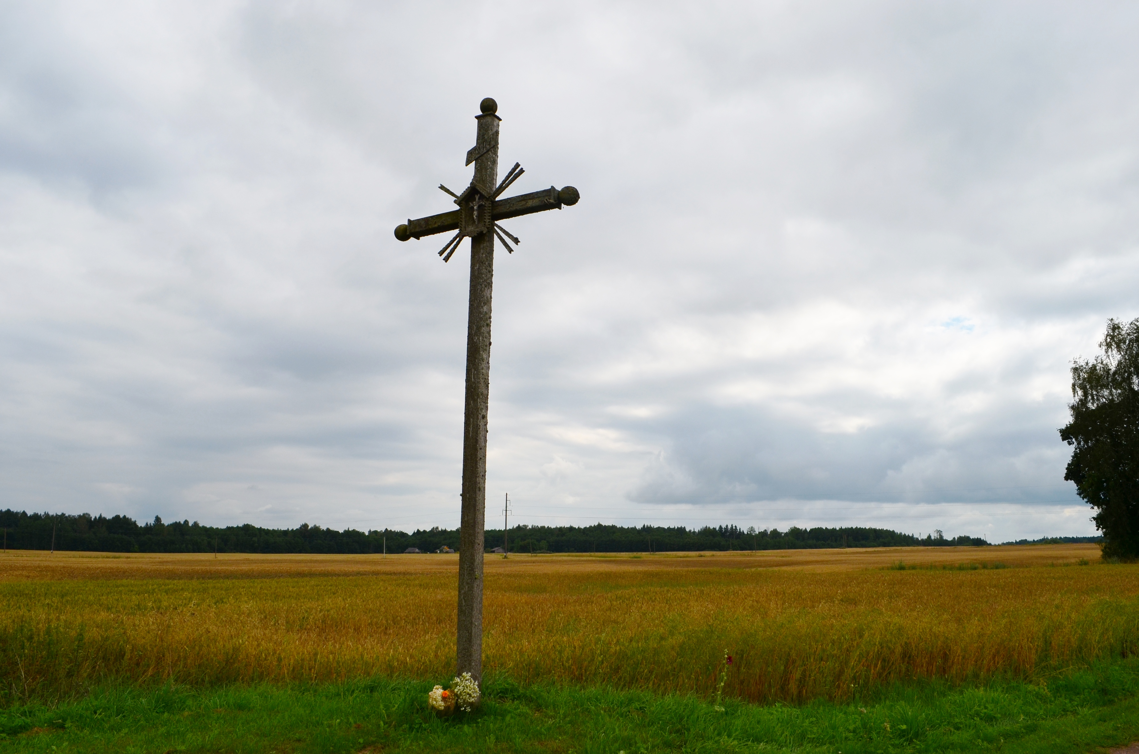 Kryžius, Dvaryščių k., Tverečiaus sen., Ignalinos raj.